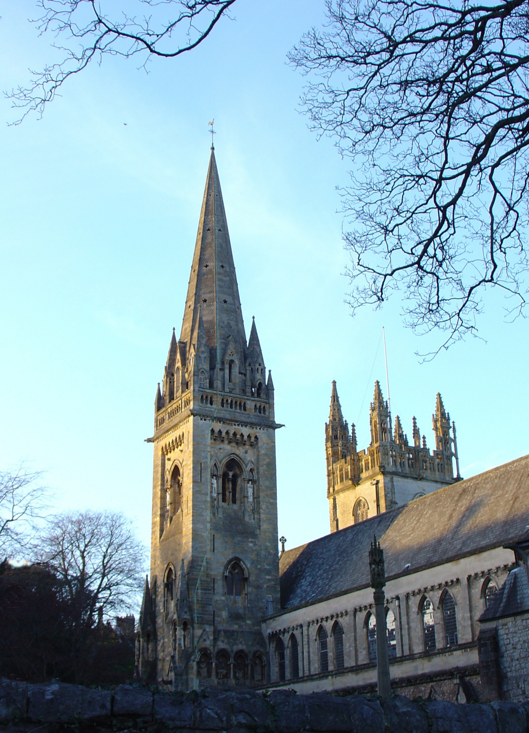 Llandaff Cathedral